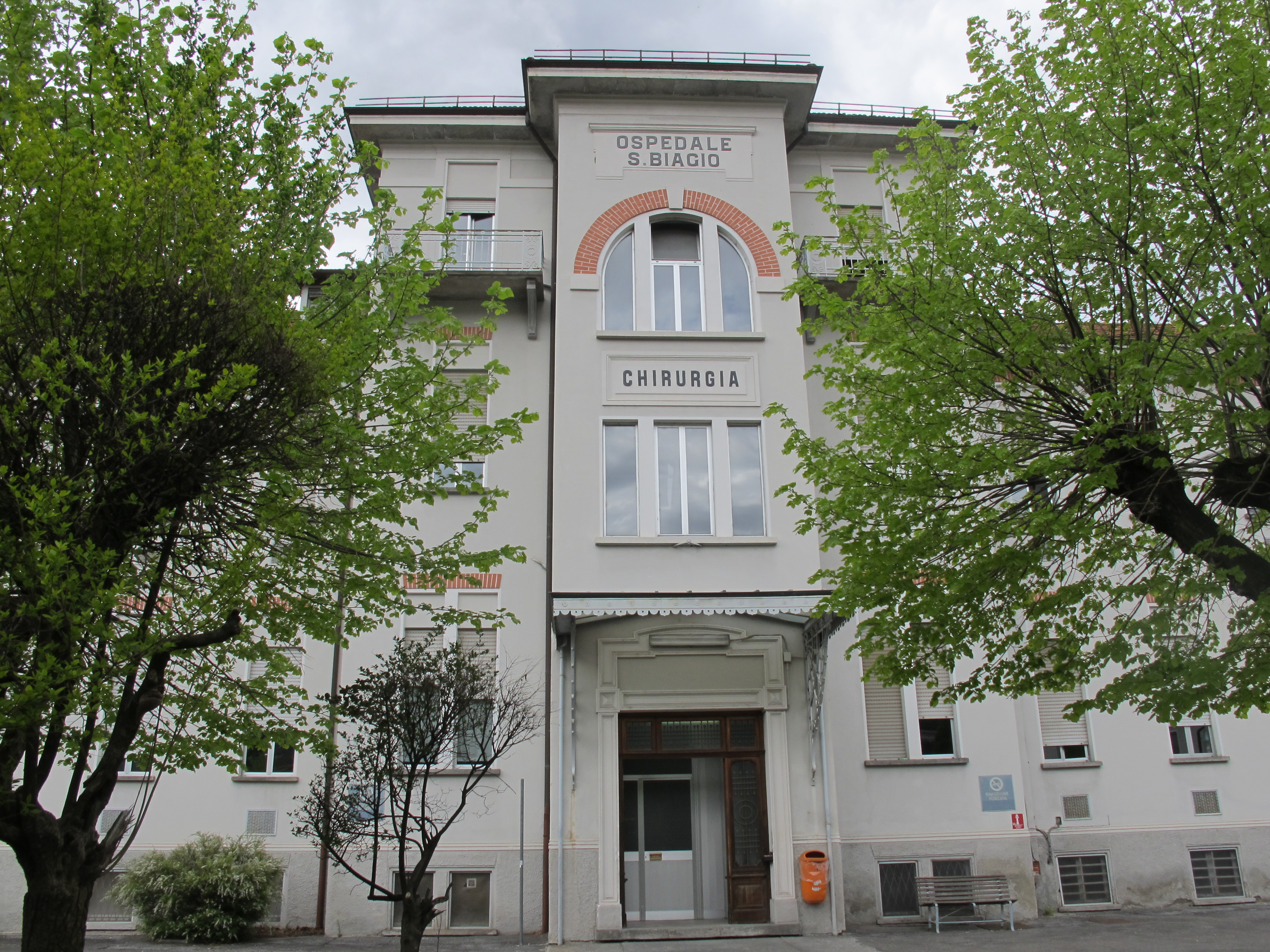 Vista dell'Ospedale San Biagio a Domodossola